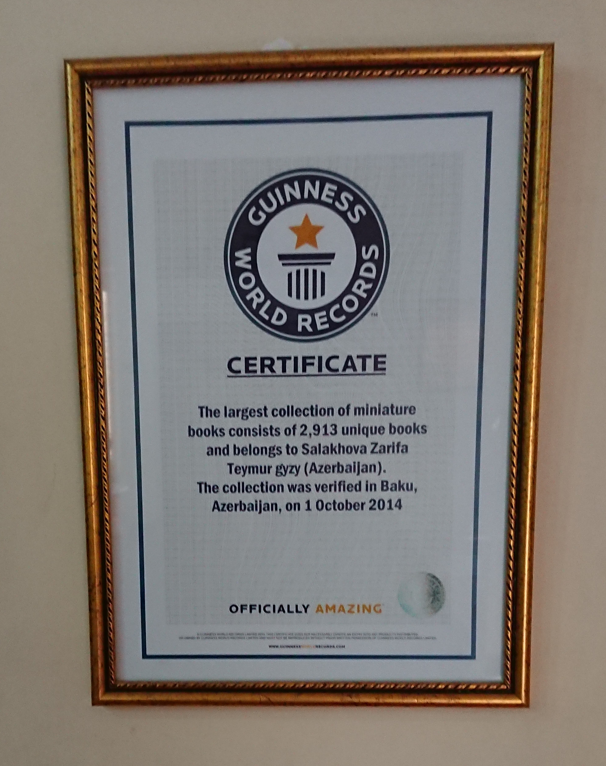 Музей миниатюрной книги, Баку. Сертификат Книги рекордов Гиннеса